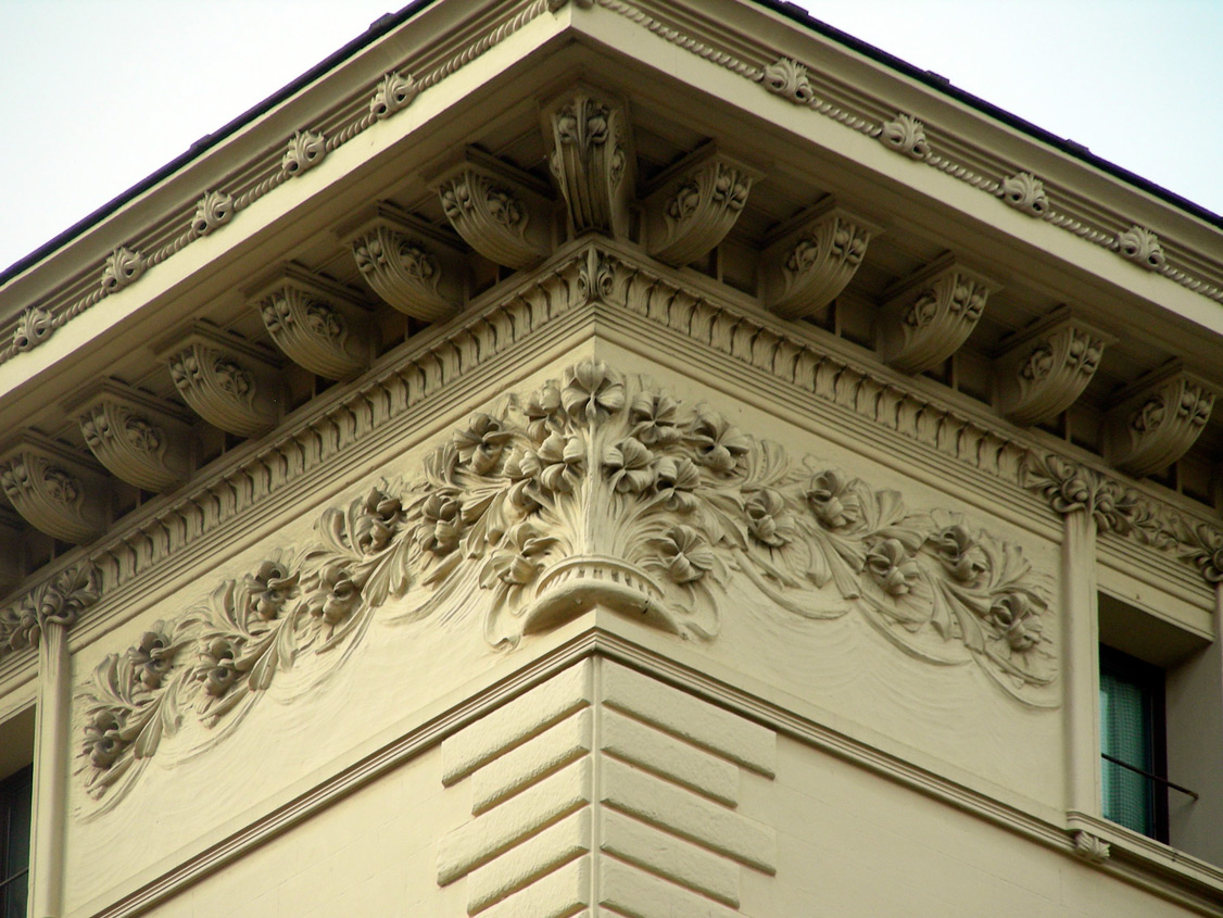 Roma, Villino Rudinì (via Quintino Sella, 60) particolare del fregio